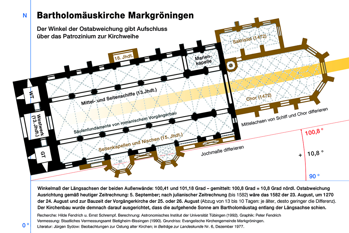 Der Winkel der Kirchenachse lässt auf das Patrozinium zur Kirchweihe schließen